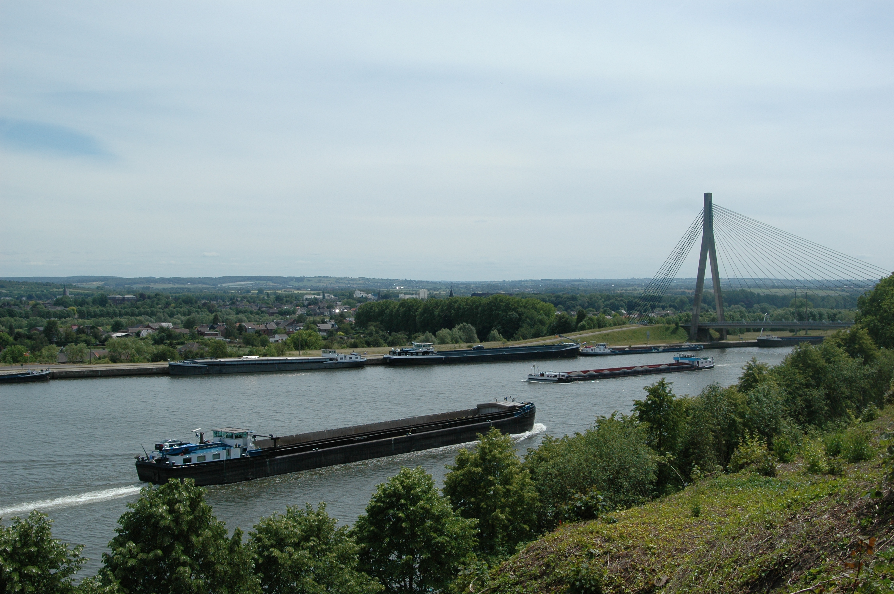 Vue depuis la Montagne Saint Pierre. Deux péniches se croisent sur le Canal Albert. Pont de Lanaye en fond